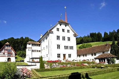 Schloss Altishofen im Amt Willisau des Schweizer Kantons Luzern